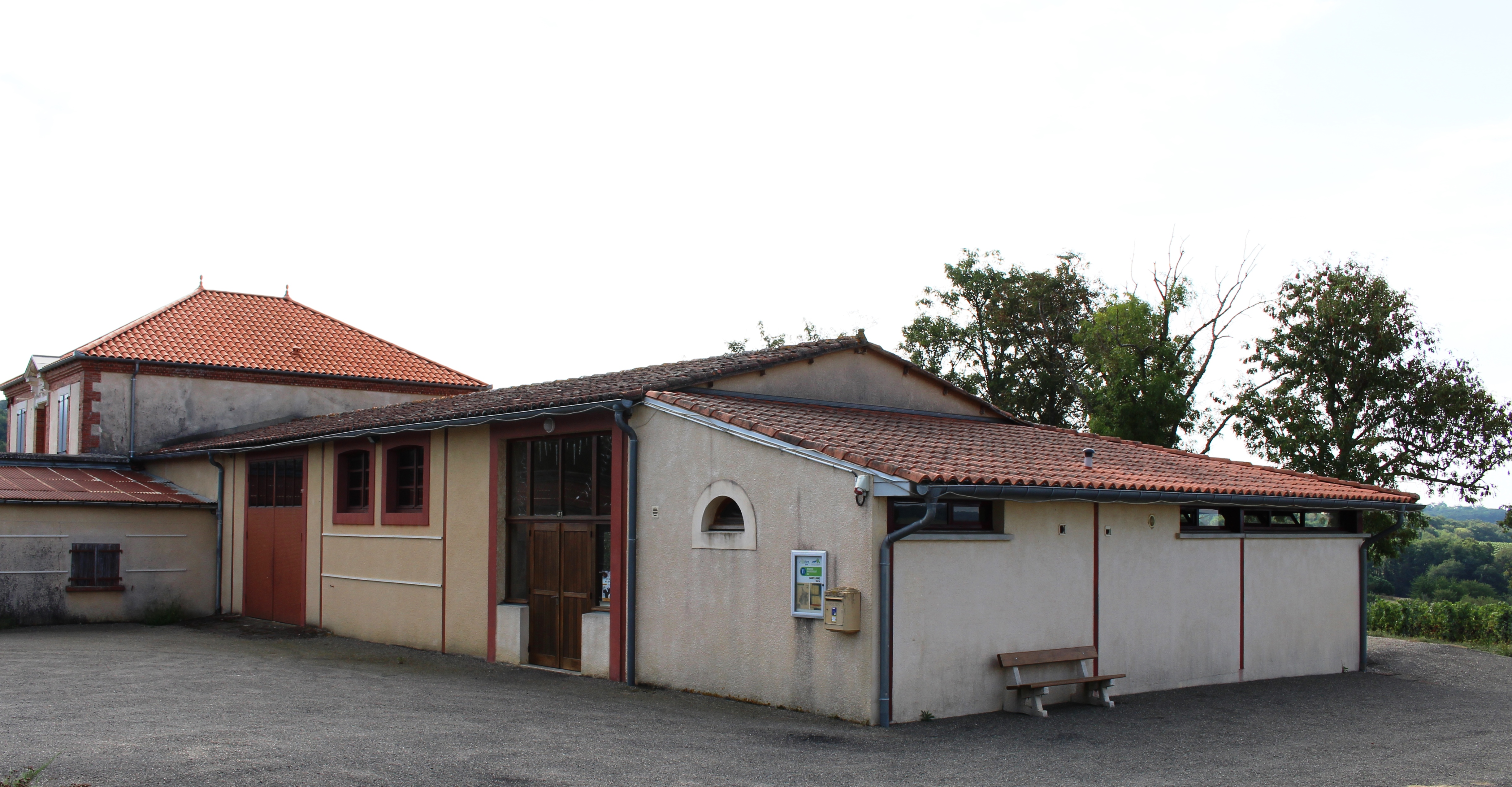 Salle des fêtes de Saint-Lanne (Hautes-Pyrénées)